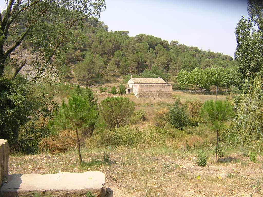 La Casella (Monistrol de Calders, Moianès)